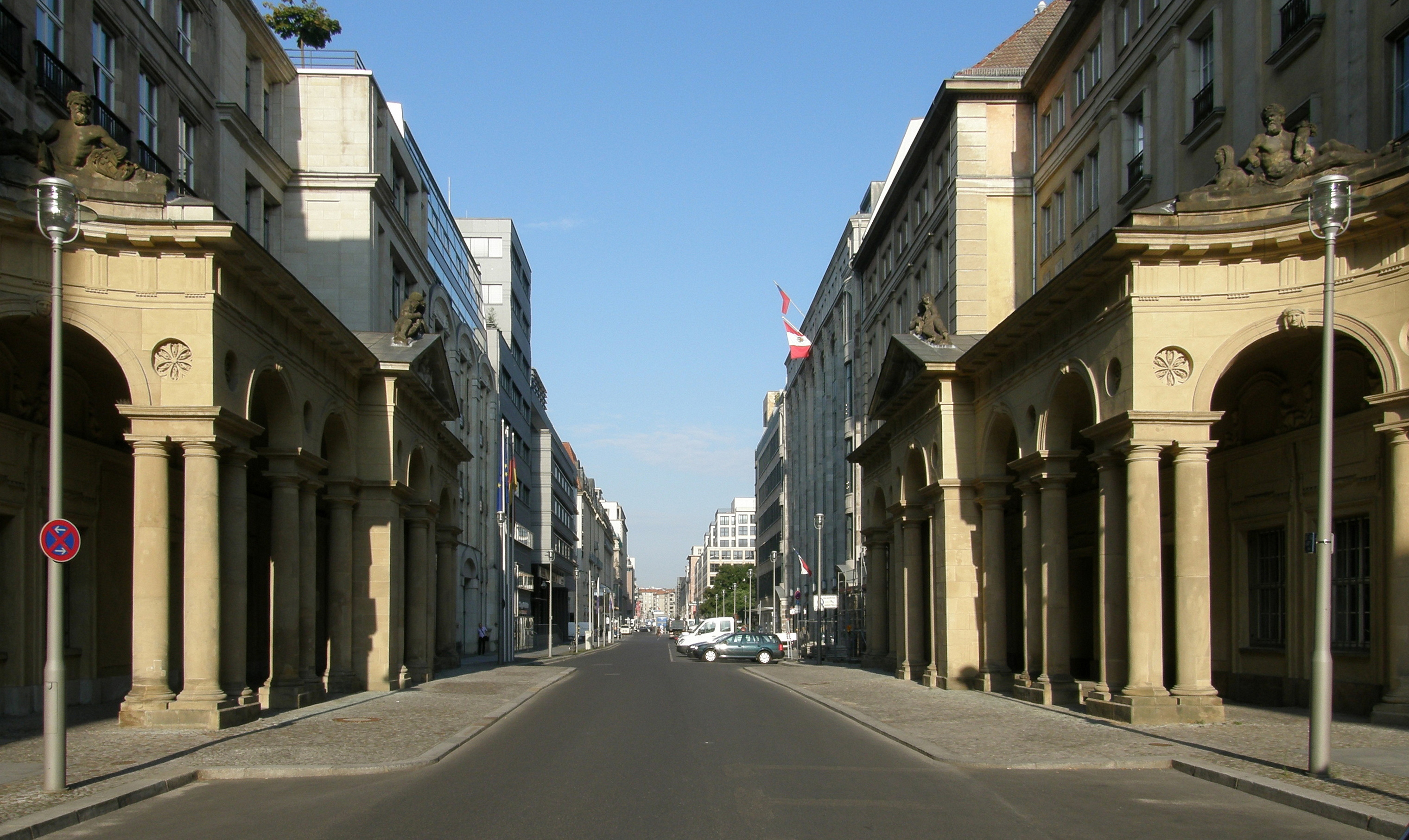 Mohrenkolonnaden beidseits der Mohrenstraße in Berlin-Mitte